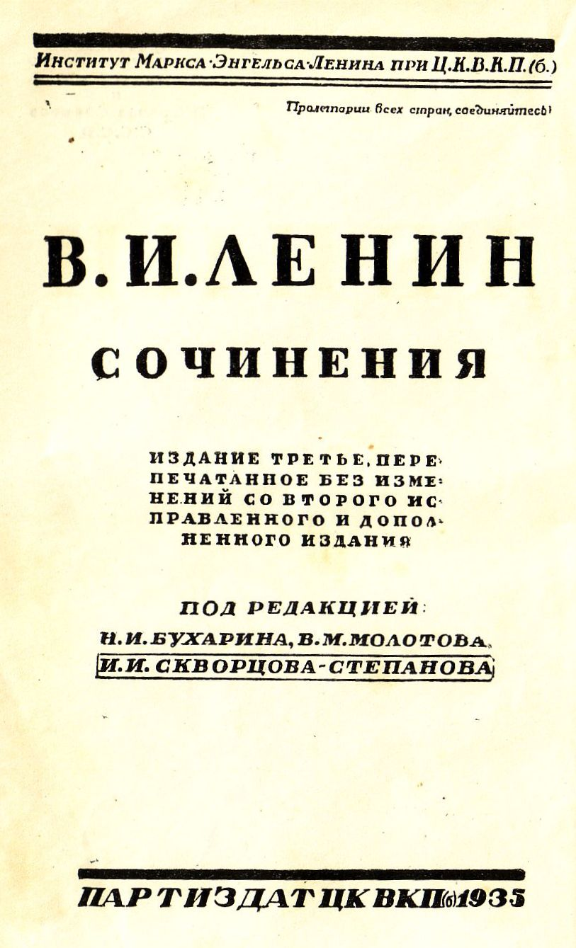 Титульный лист 25 тома ПСС В.И. Ленина 1935 года